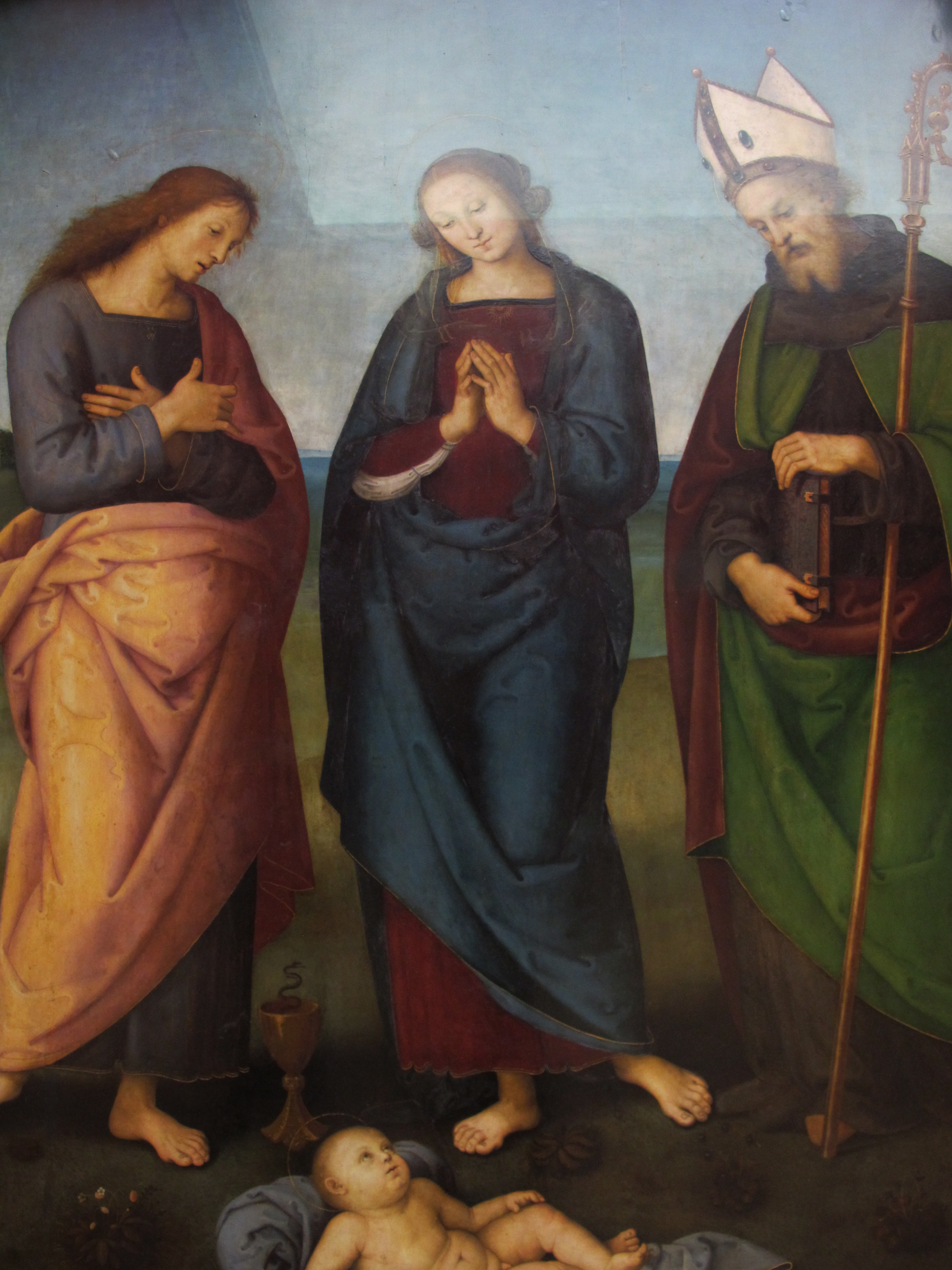 detail